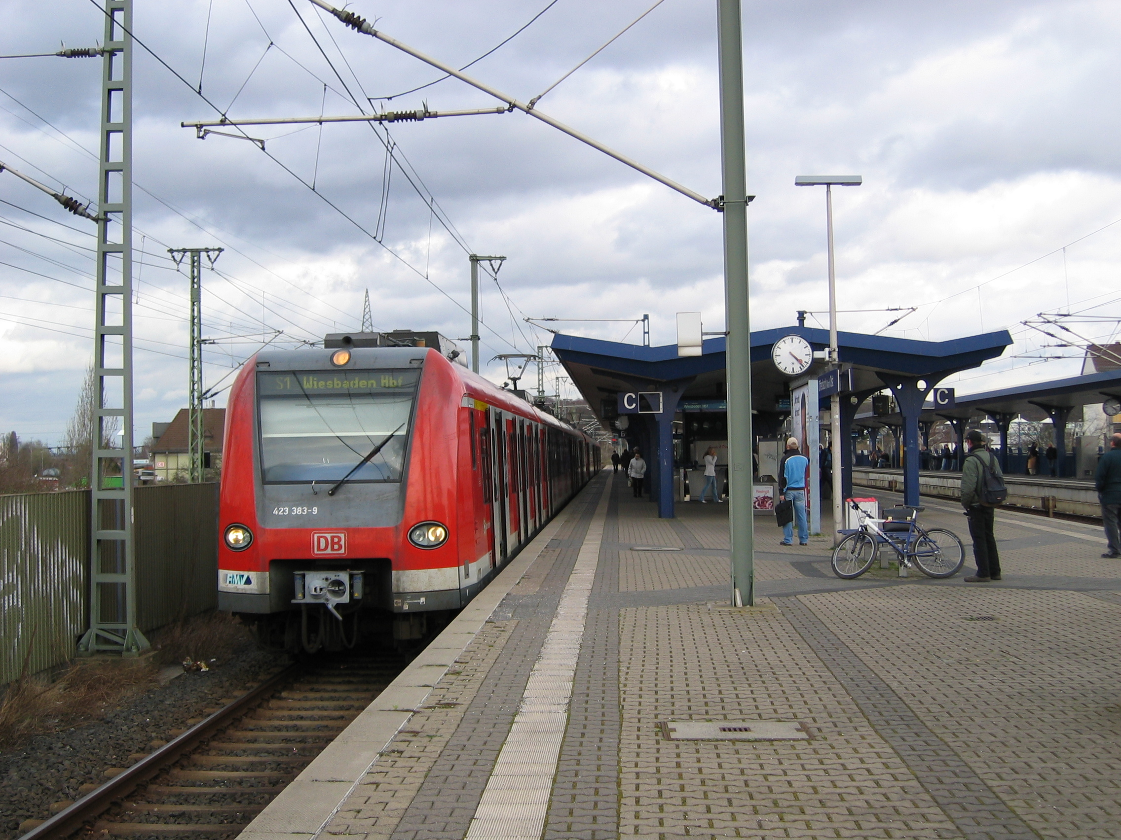 Train type 423 in Offenbach am Main-Ost, Germany, line S1 to Wiesbaden, platform 3 / Baureihe 423 in Offenbach am Main-Ost, Linie S1, Gleis 3